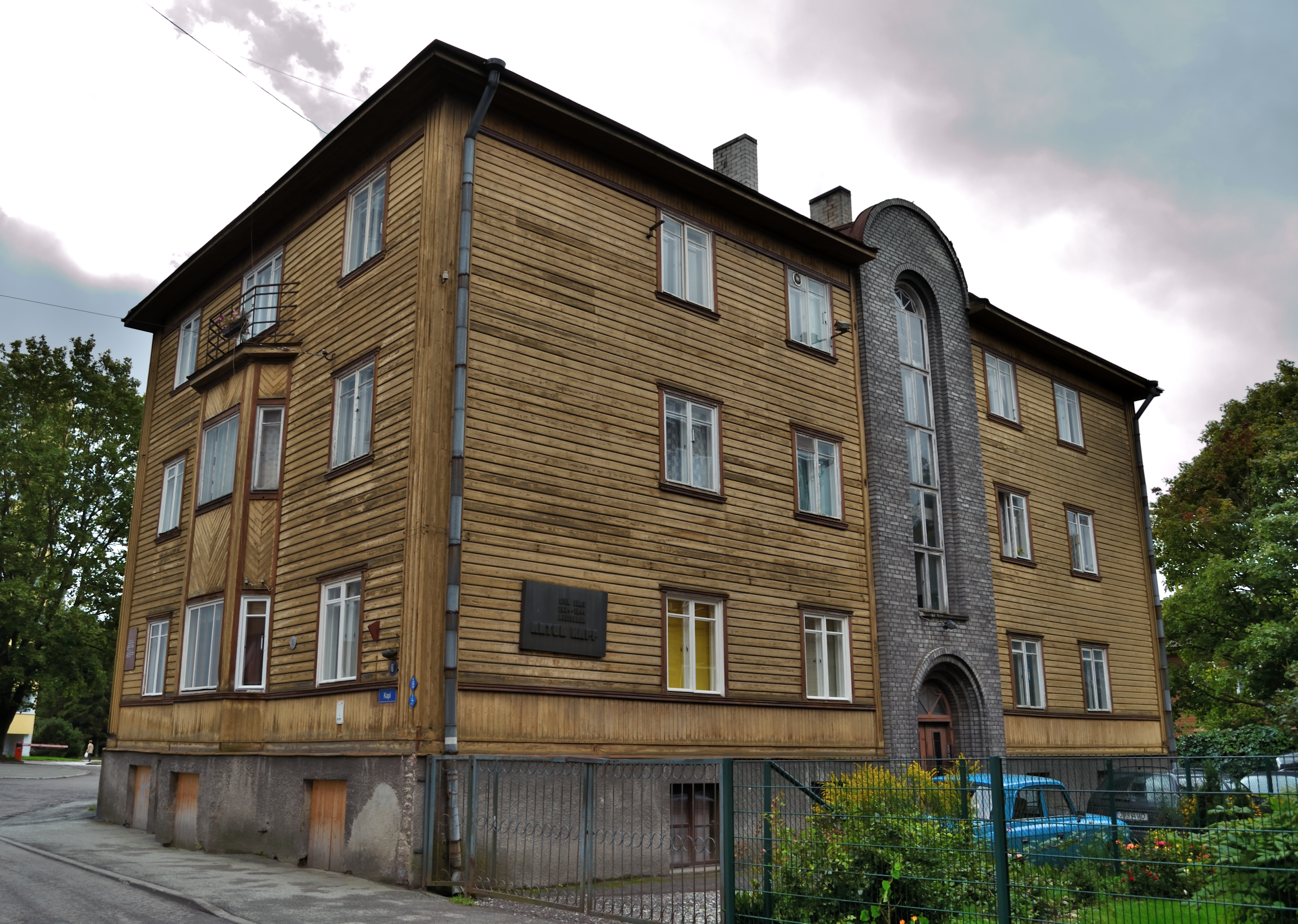 Tallinn, elamu A.Kapi 8, 1935